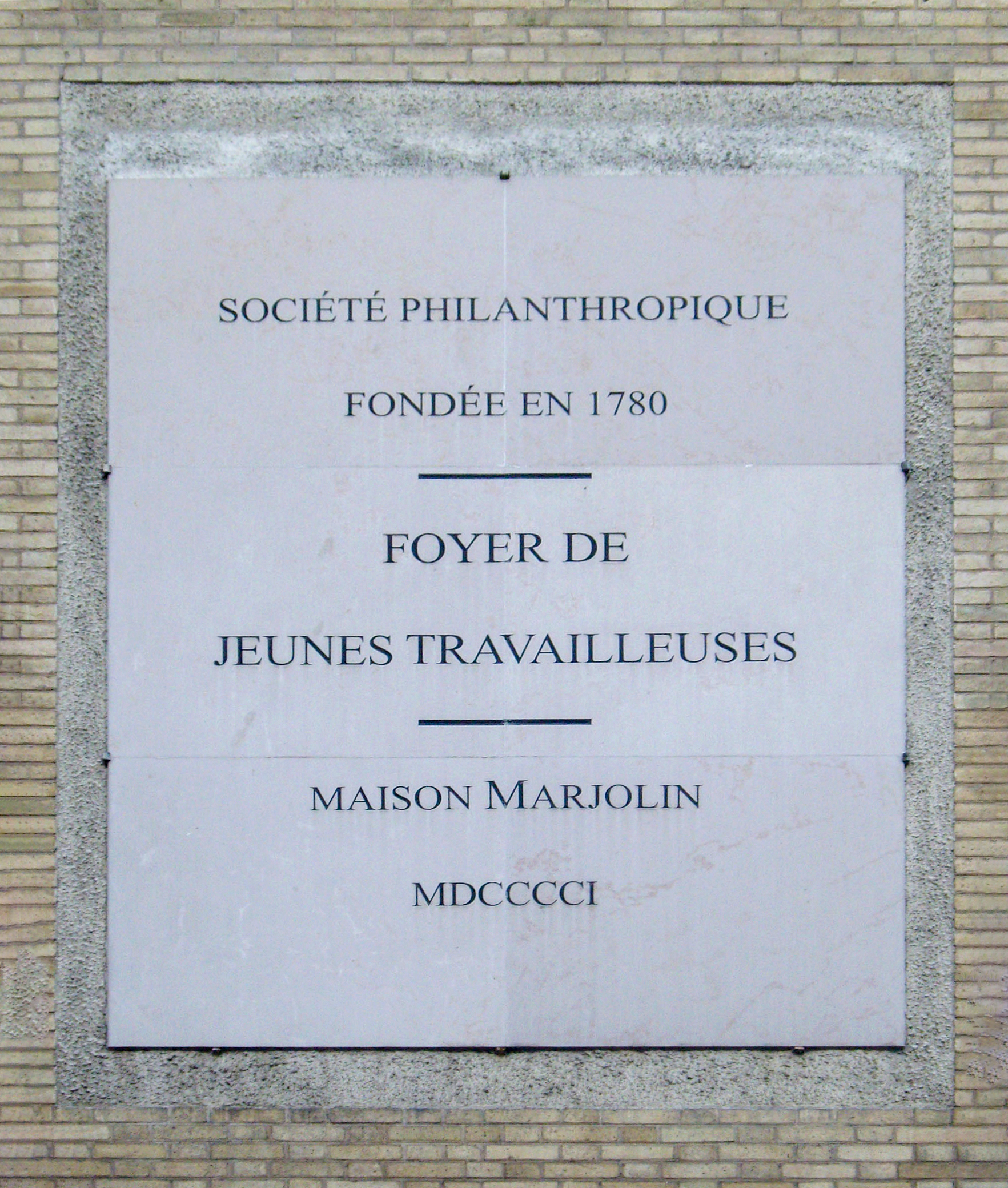 Plaque de la Société philanthropique, Maison Marjolin, 37 rue Eugène-Carrière, Paris 18e. « Société philanthropique fondée en 1780. Foyer de jeunes travailleuses. Maison Marjolin. MDCCCCI. »Note : Hôtel meublé pour dames et jeunes filles inauguré en 1902.